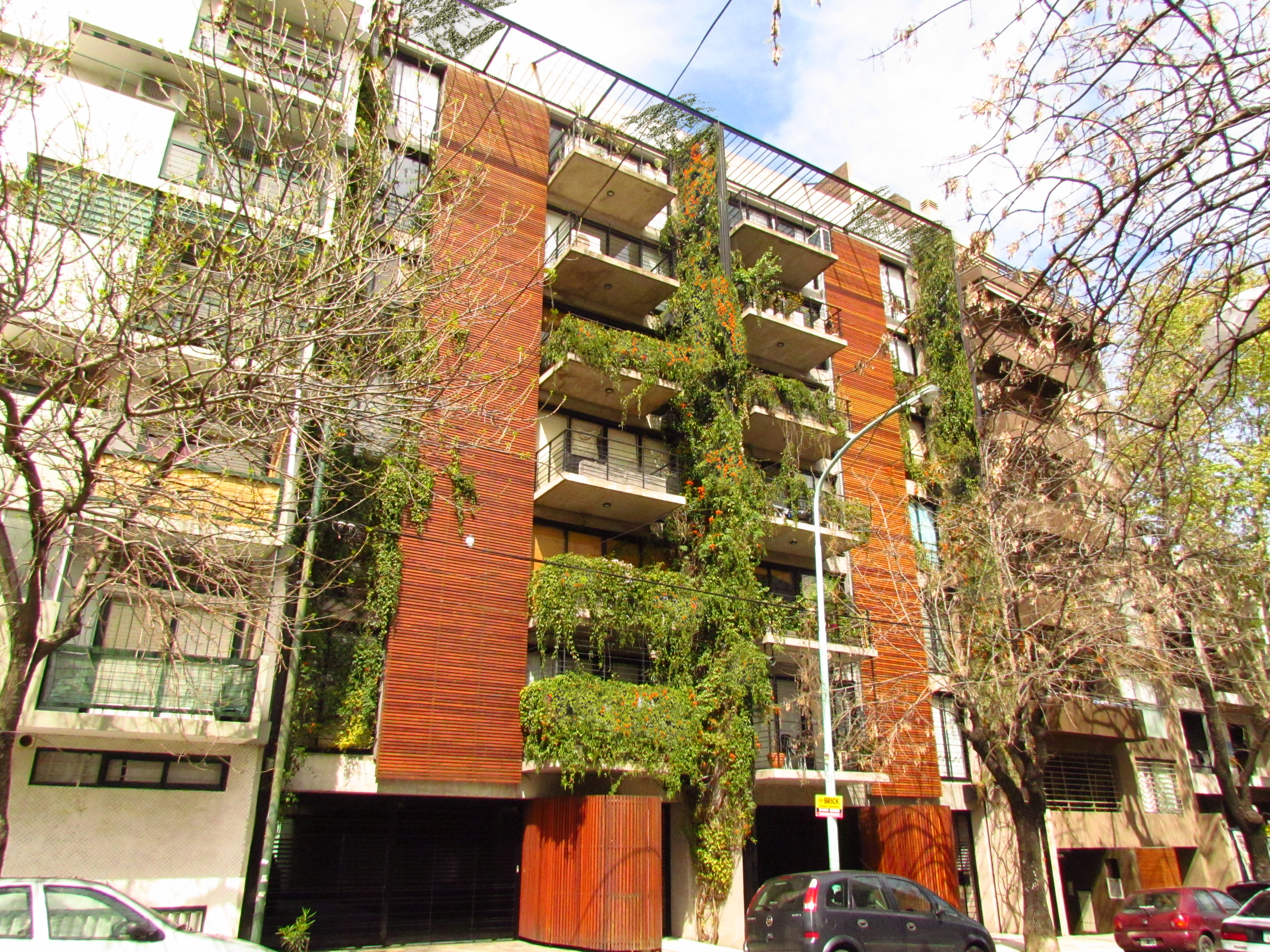 Edificio Maure 3310-3320, Buenos Aires, del Puerto-Sardin Arquitectos, 2008